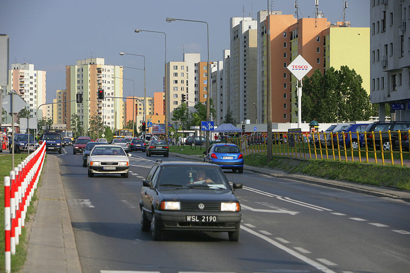 Tarchomin, osiedle na Białołęce. Okolice ulicy Światowida.